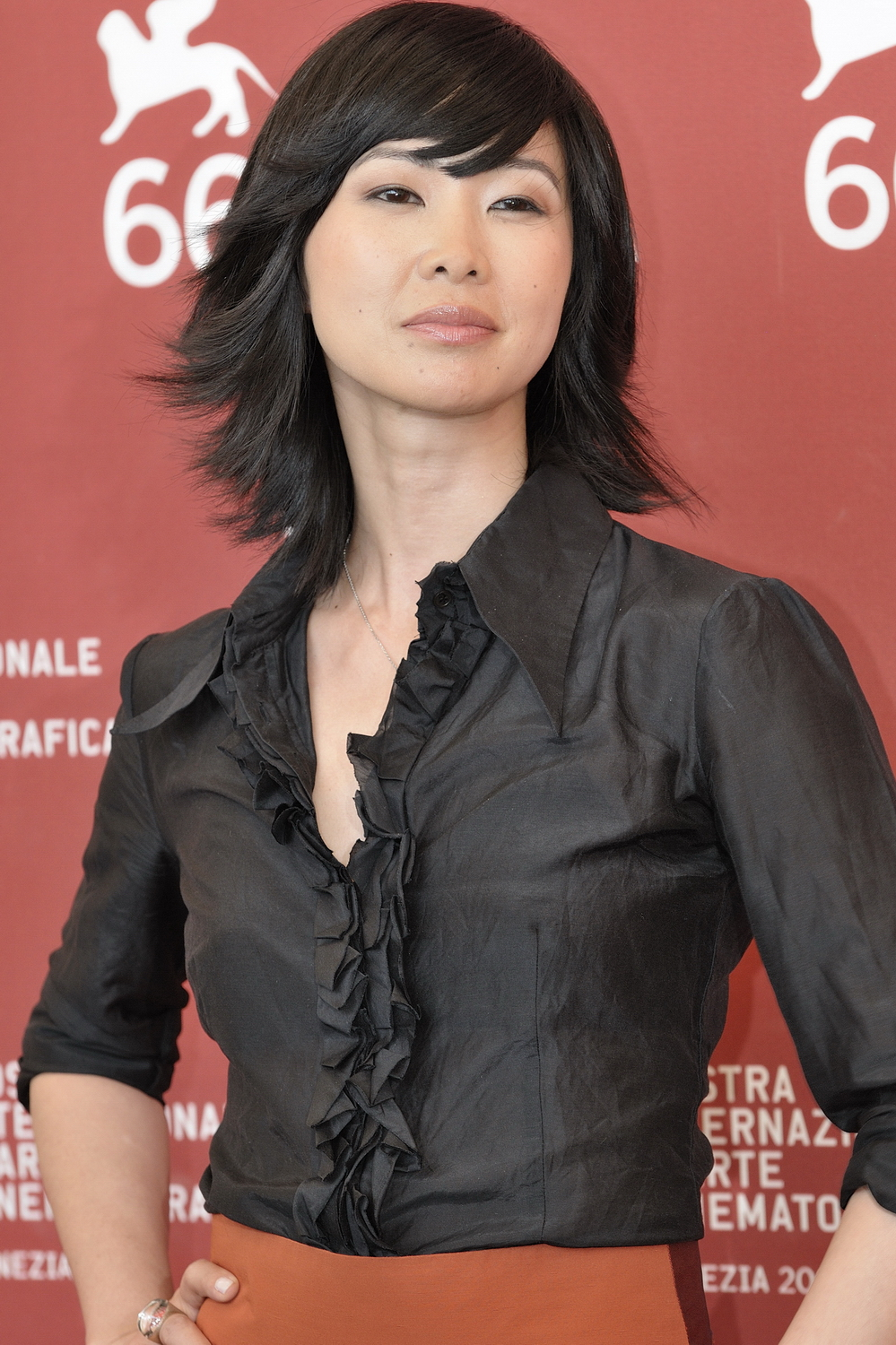 66ème Festival du Cinéma de Venise (Mostra), 10ème jour (11/09/2009) Photocall avec Jared Leto, Diane Kruger, Sarah Polley et le réalisateur Jaco Van Dormel pour le film : MR. NOBODY